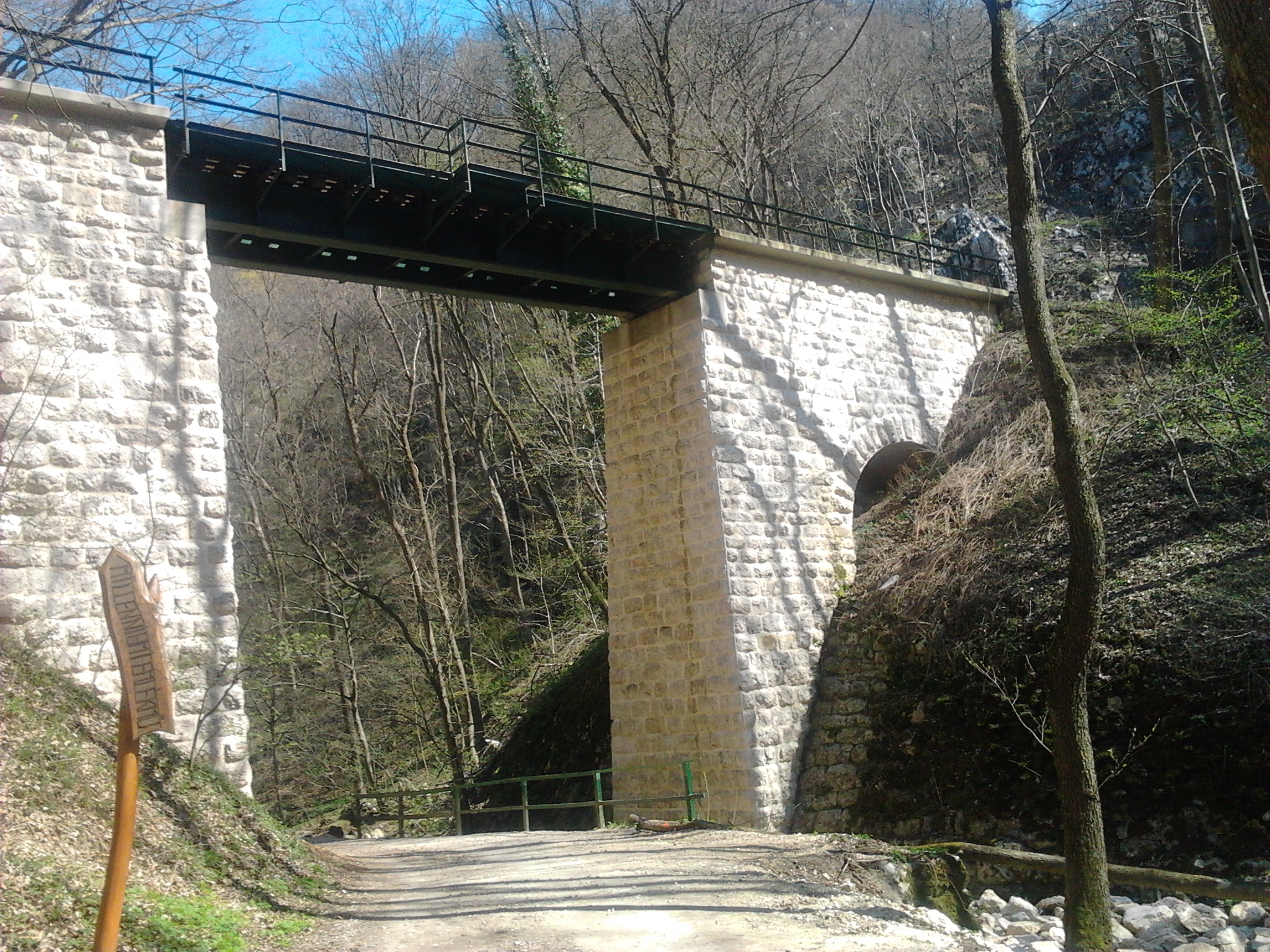 A Gubányi Károly viadukt a Cuha-patak völgyében